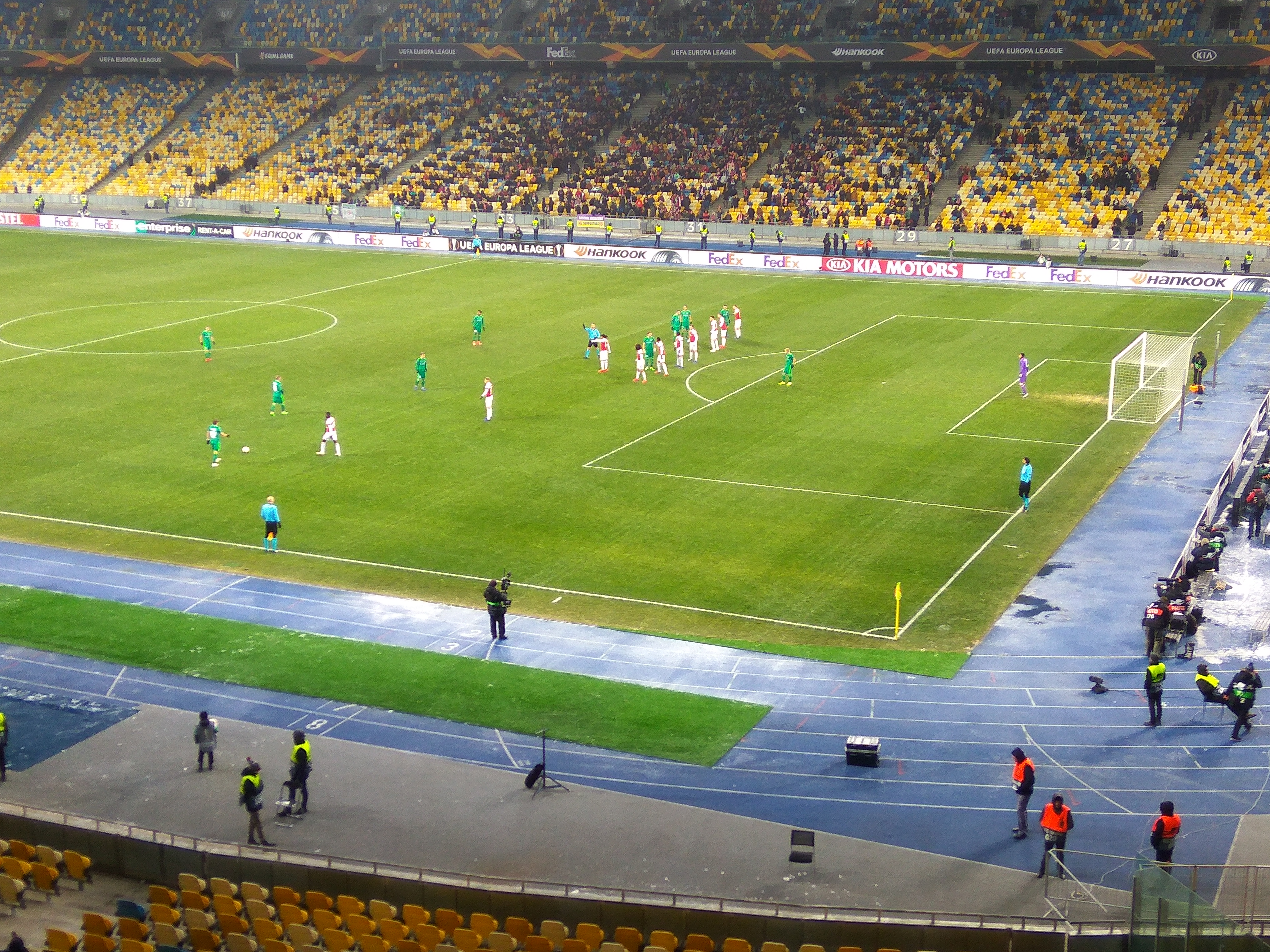 29.11.2018. Ліга Європи УЄФА. Ворскла (Полтава) - Арсенал (Лондон) 0:3